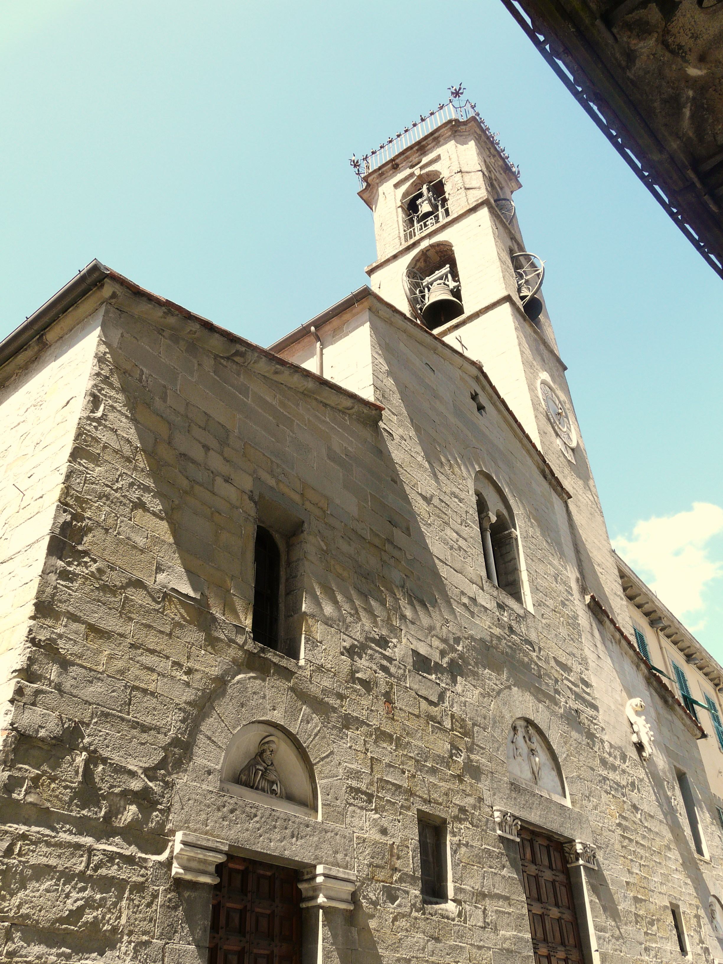 Chiesa dei Santi Jacopo e Antonio, Fivizzano, Toscana, Italia